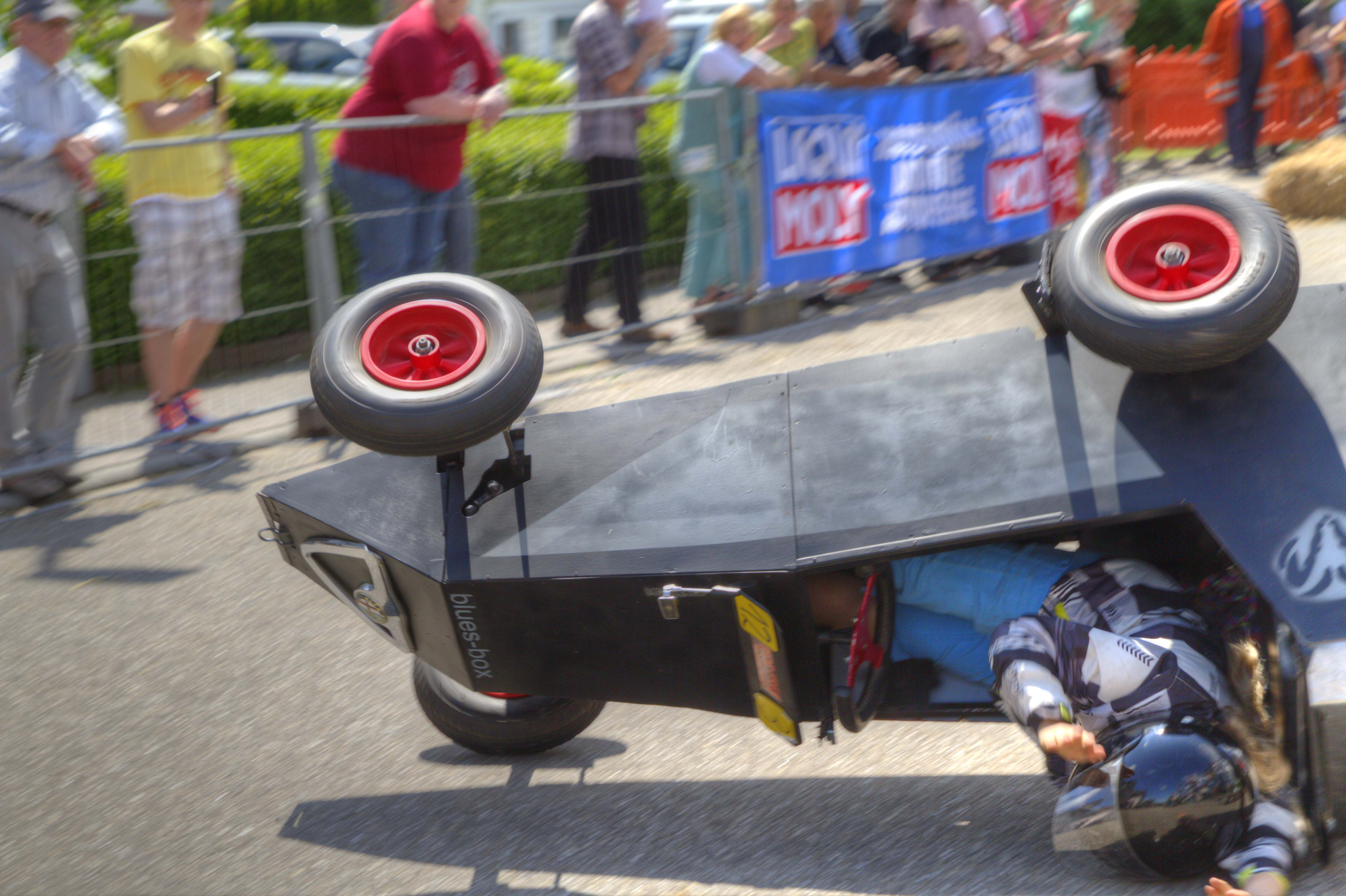 Eine Seifenkiste beim Völkersbacher Brunnenfest, einem Teilort von Malsch.